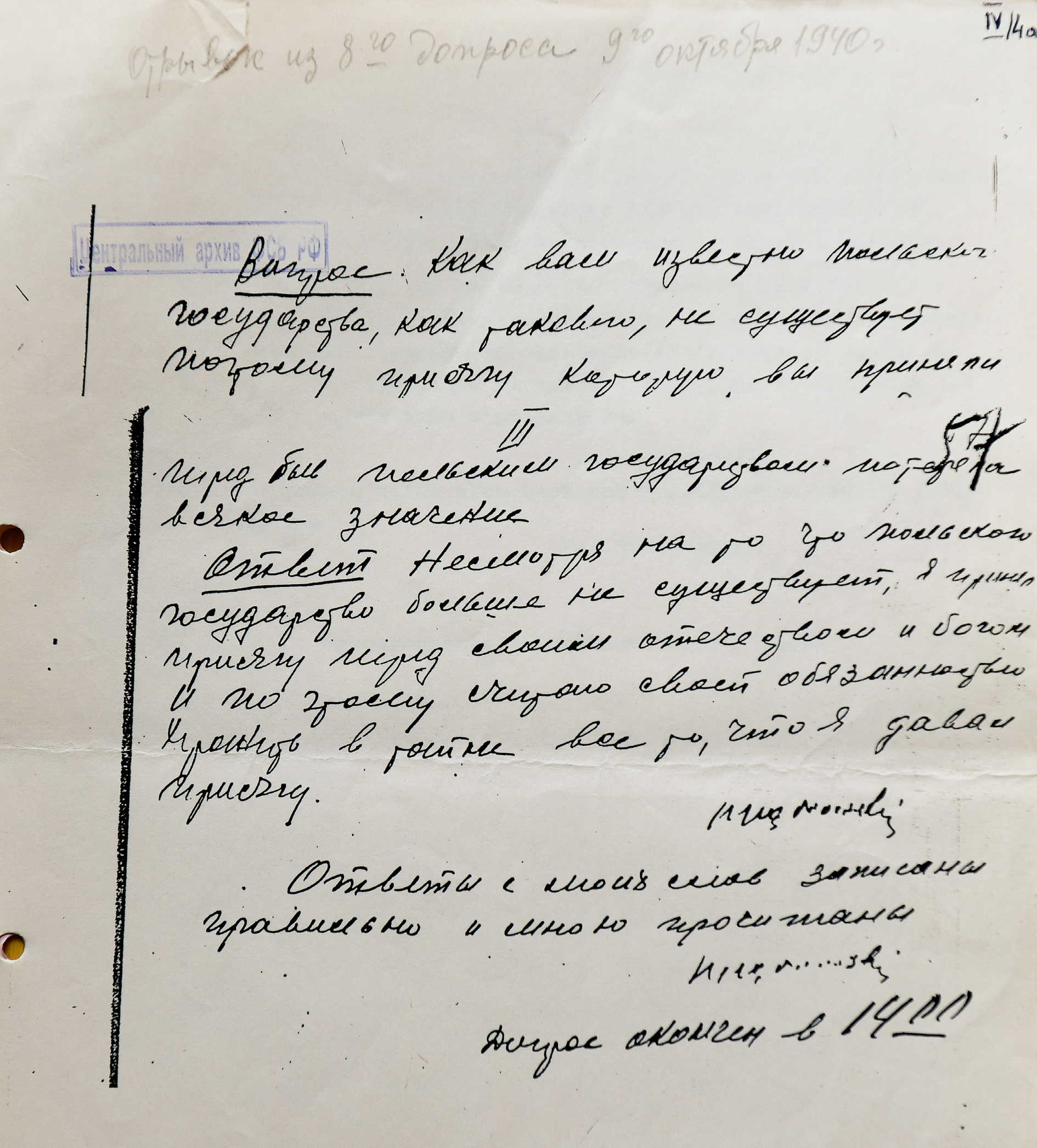 Fragment protokołu z 8-mego przesłuchania mjr dypl. Kazimierza Szpądrowskiego w dniu 9 października 1940r. w Lefotrowskim więzieniu NKWD. Widoczne odręczne podpisy Kazimierza Szpądrowskiego potwierdzające zeznania.